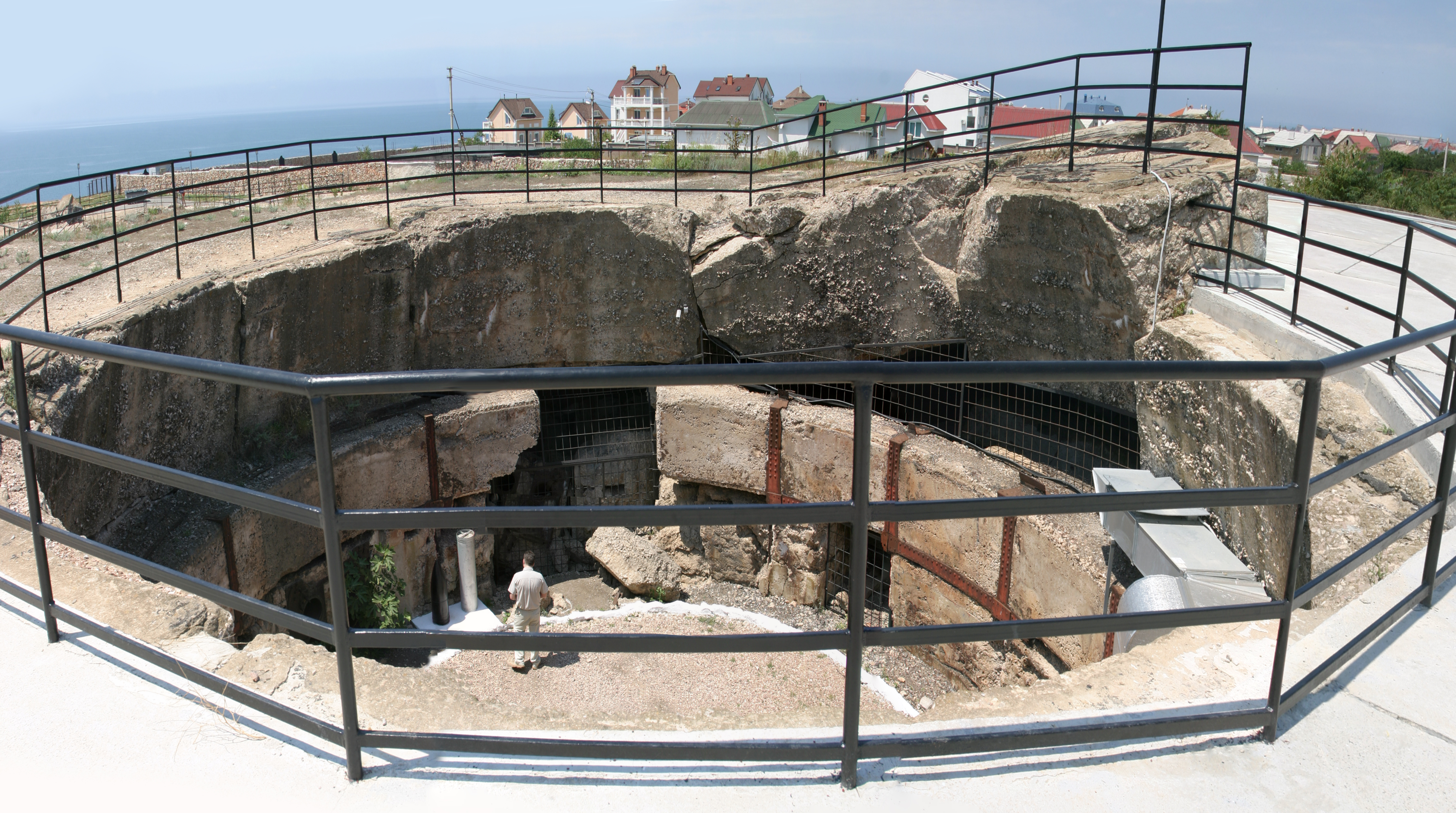 Барбет первой башни